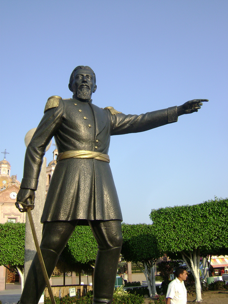 Estatua en honor al "Benemérito de Tabasco", el Coronel Gregorio Méndez Magaña. Está ubicada en el parque central del municipio de Jalpa de Méndez